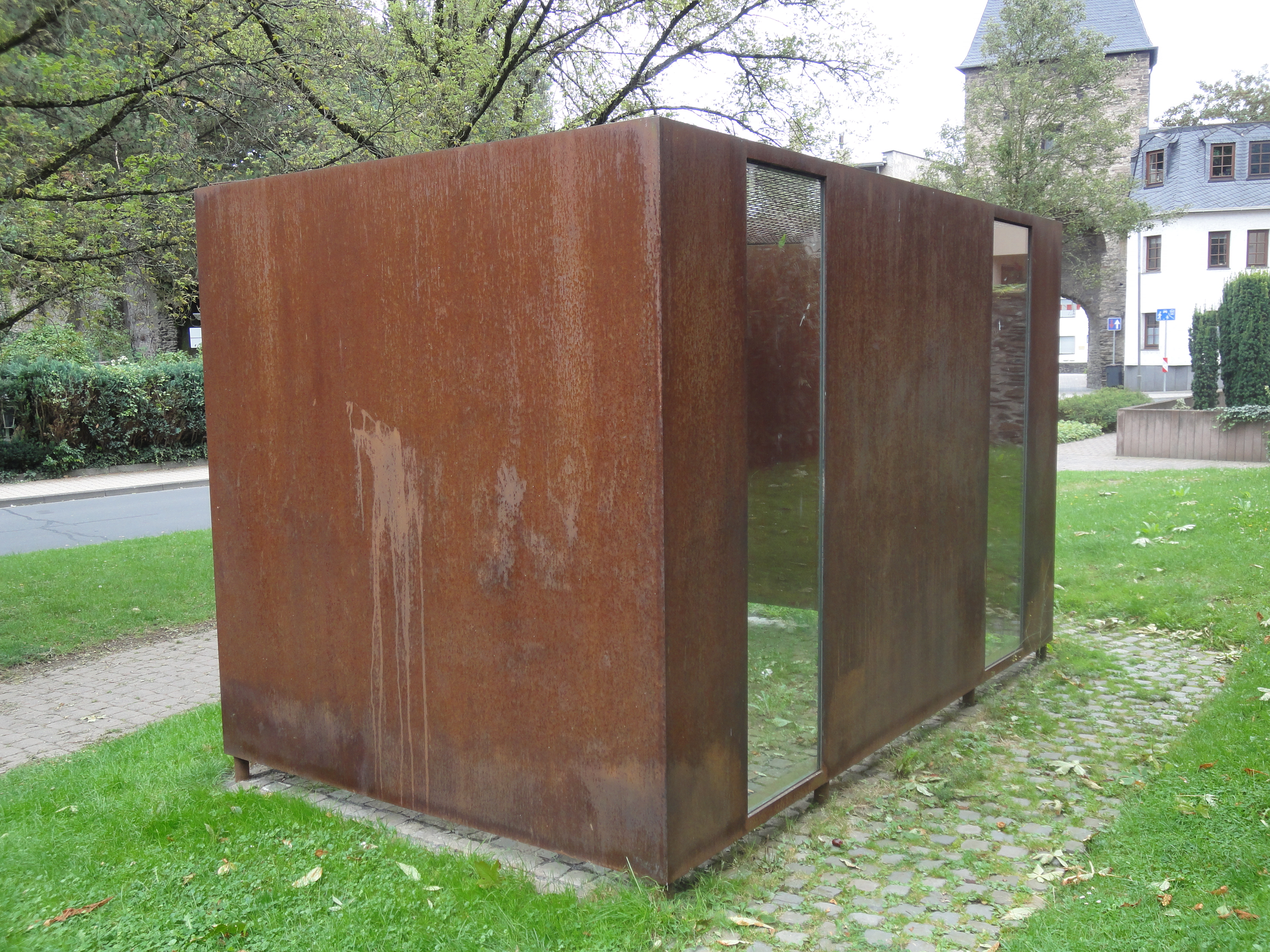 Der Spiegel Container als Euthanasie Mahnmal in Andernach